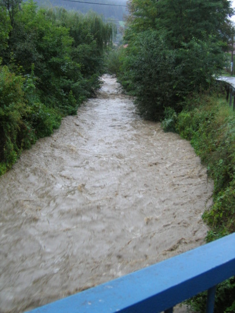 Potok Ochodničanka po výdatných zrážkach